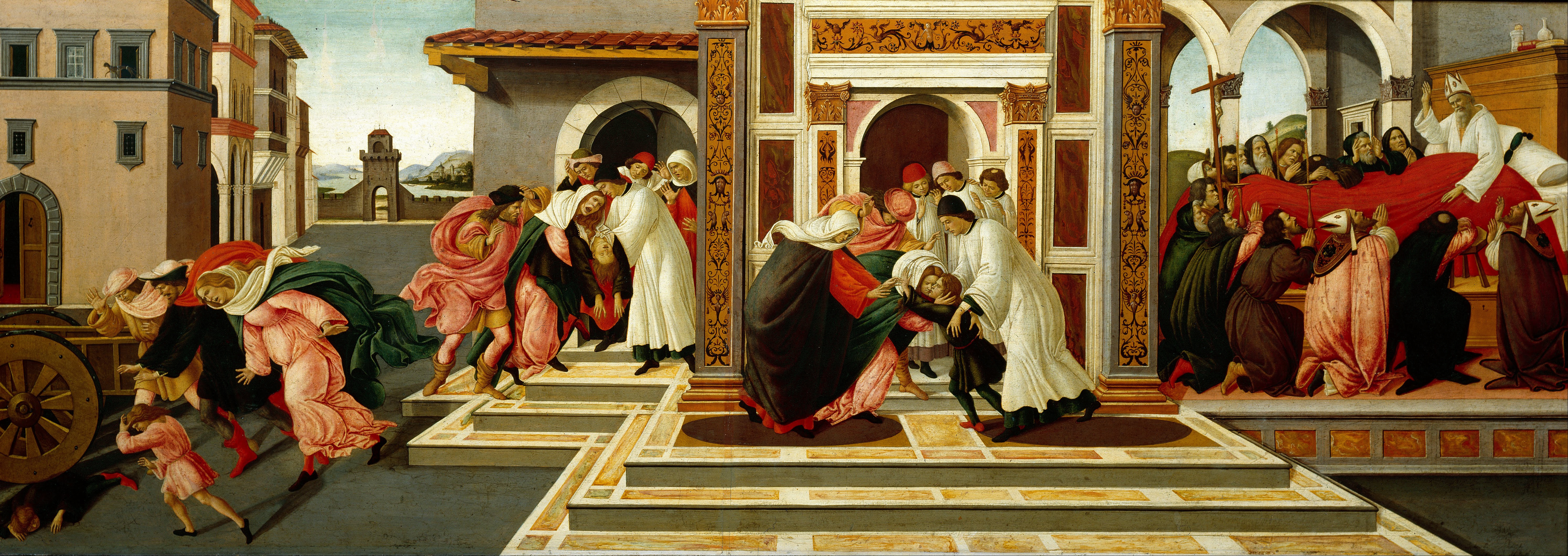 Die zeitlich aufeinanderfolgenden Szenen werden simultan dargestellt. Links wiedererweckt der Diakon des heiligen Zenobius einen Jungen, der starb, als ihn ein Wagen überrollte. Rechts ist der Tod des heiligen Zenobius 417 dargestellt.